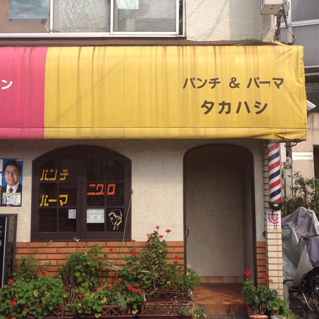 ？ パンチとパーマって別物なの？